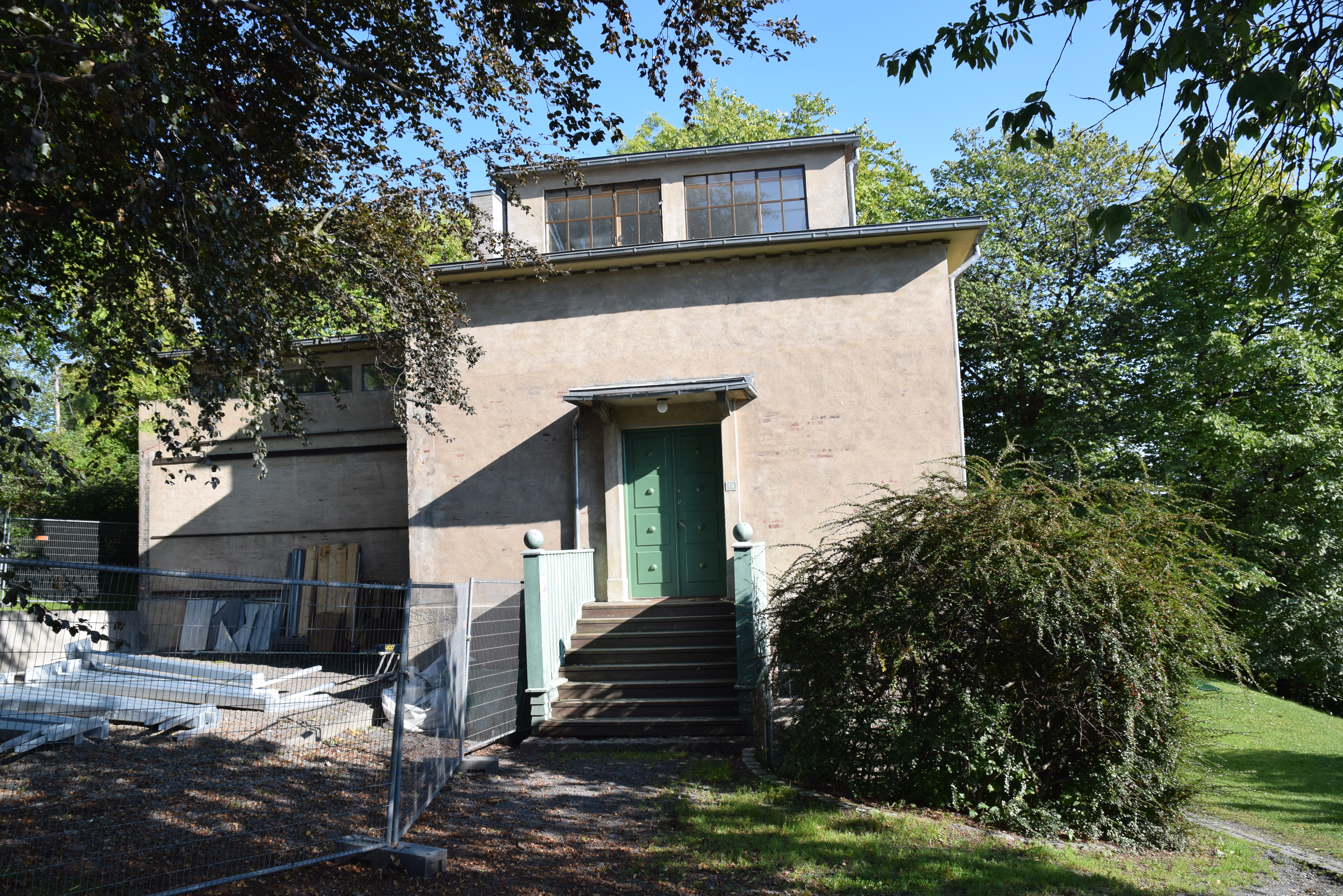 Ekely, inngangen til Edvard Munchs vinteratelier